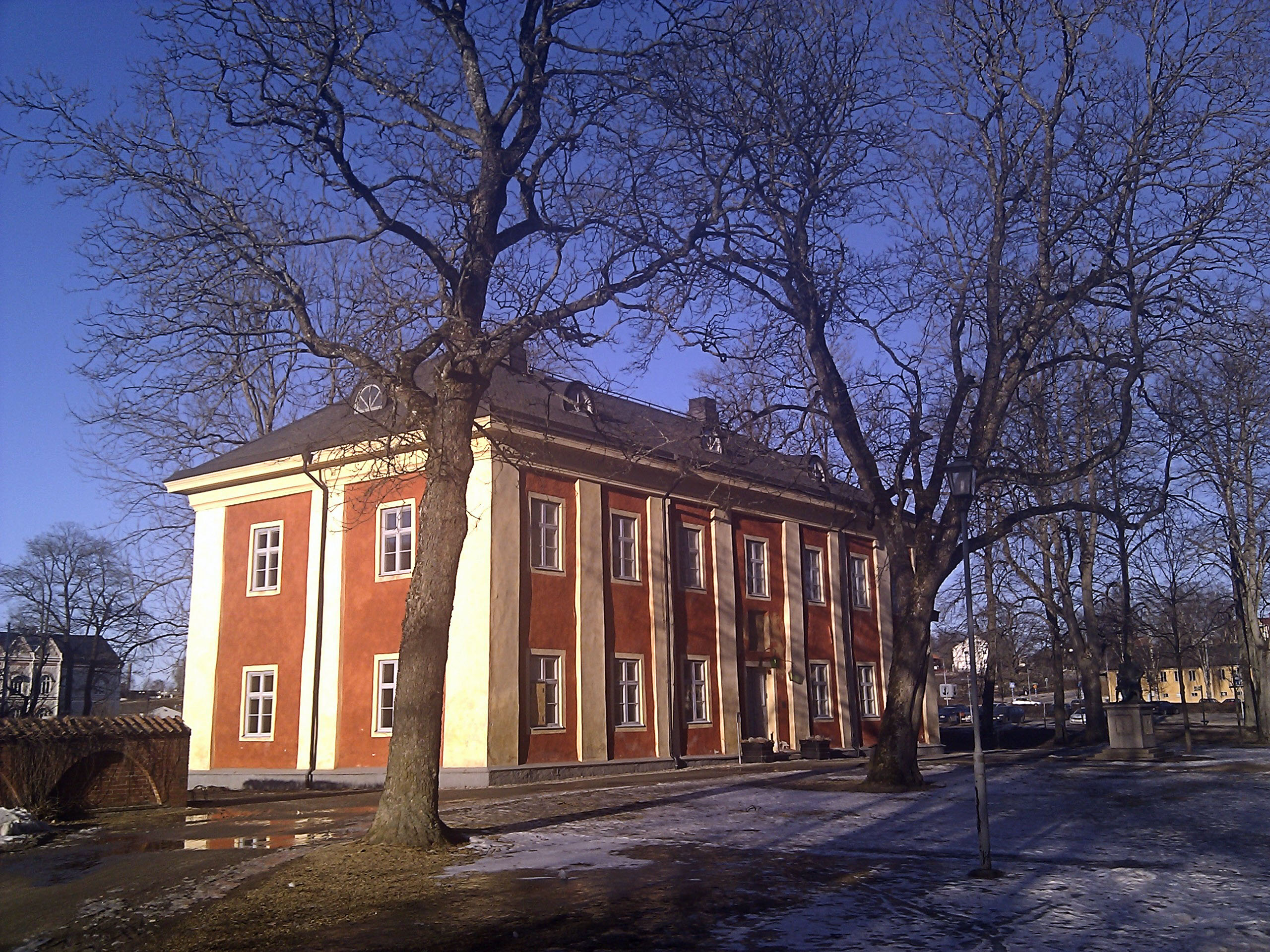 Karolinerhuset i Växjö sedd från sidan